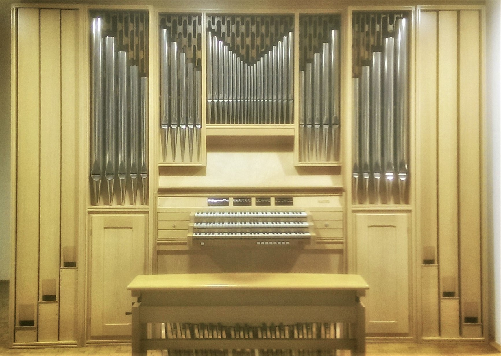 Matthias-Grünewald-Gymnasium Würzburg; Meyer-Orgel in der Johann-Nepomuk-Neumann-Kapelle